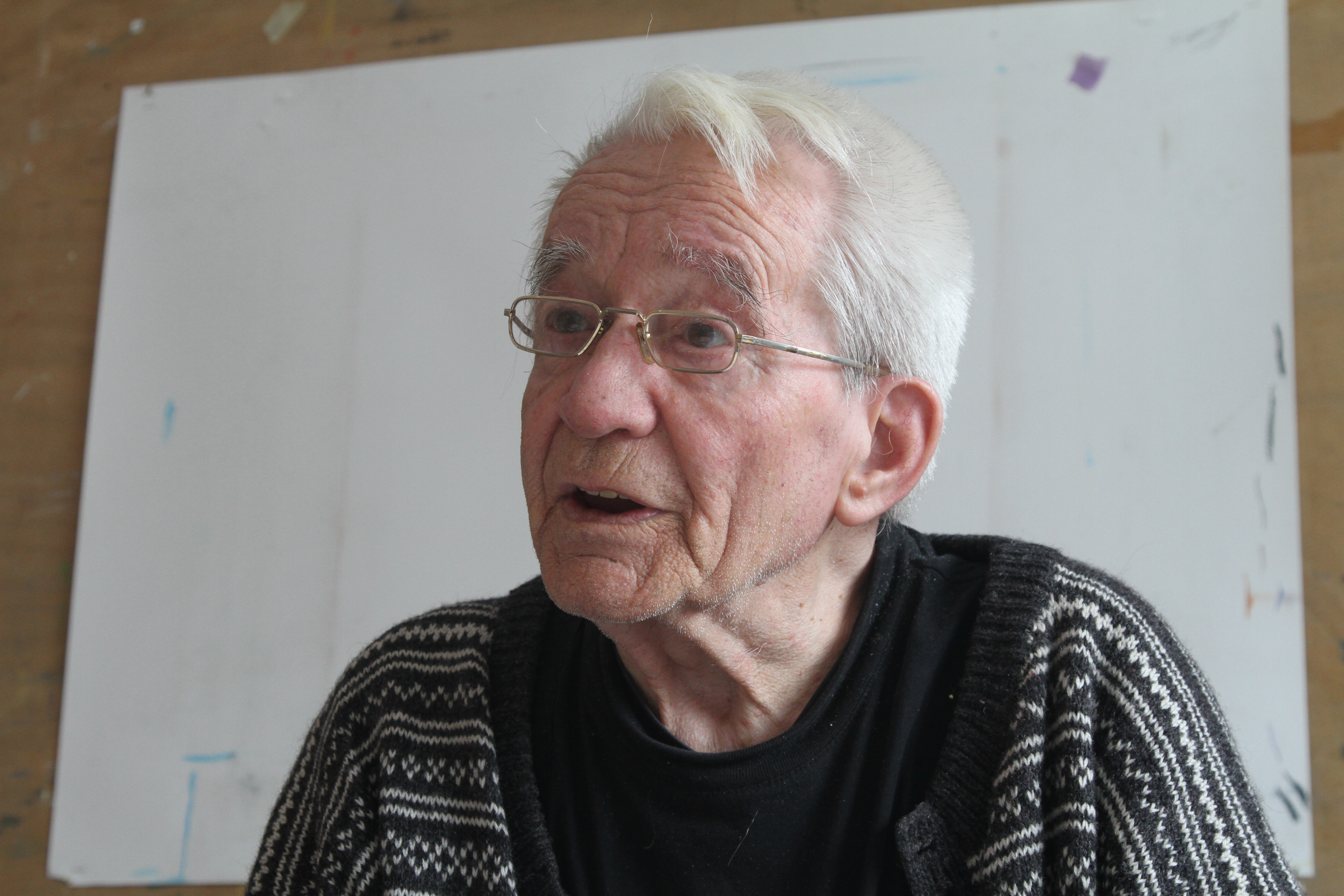 Trygve Lund Guttormsen i sin ateljé i Masi/Máze i Kautokeino kommun. Foto från april 2012